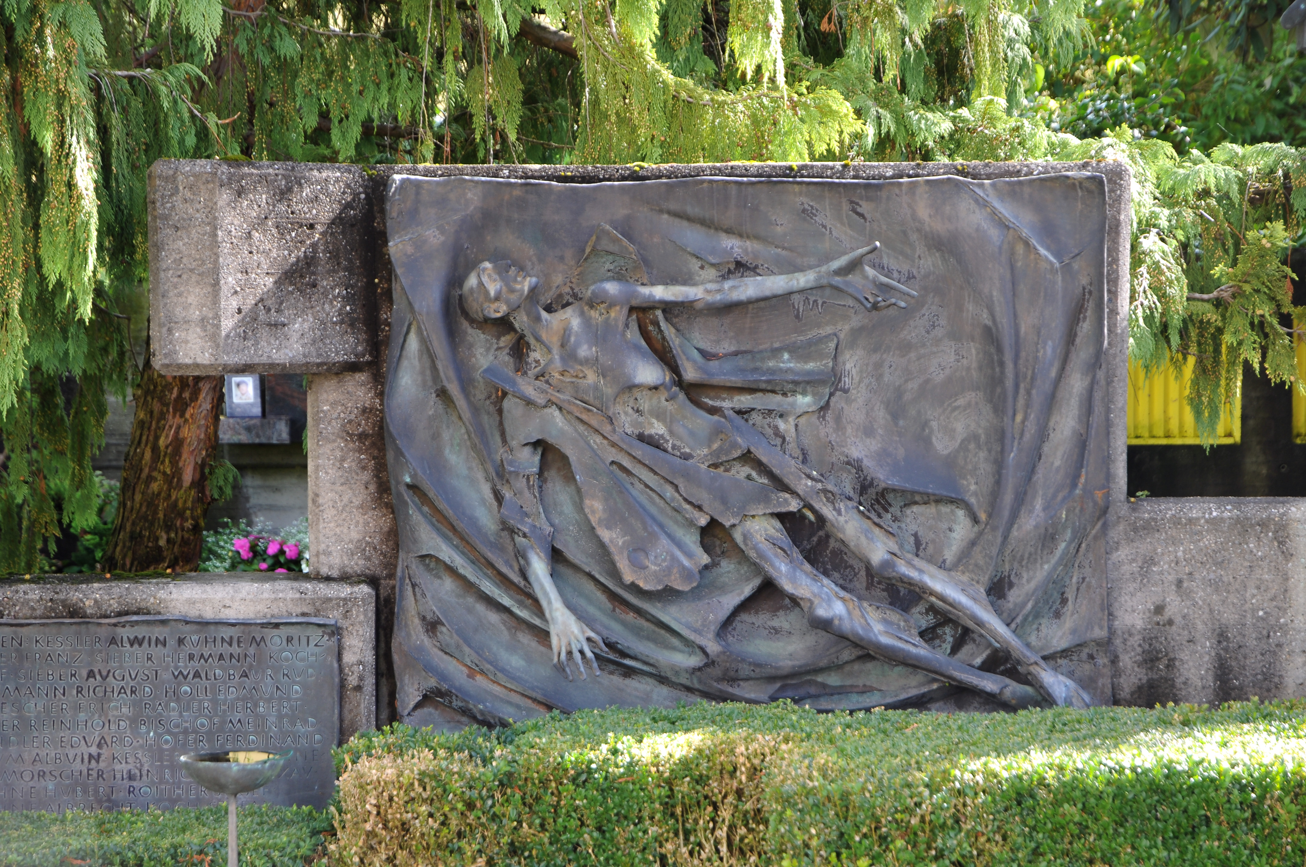 Gefallenendenkmal (1939–1945) von Albert Wider in Meiningen (Vorarlberg).